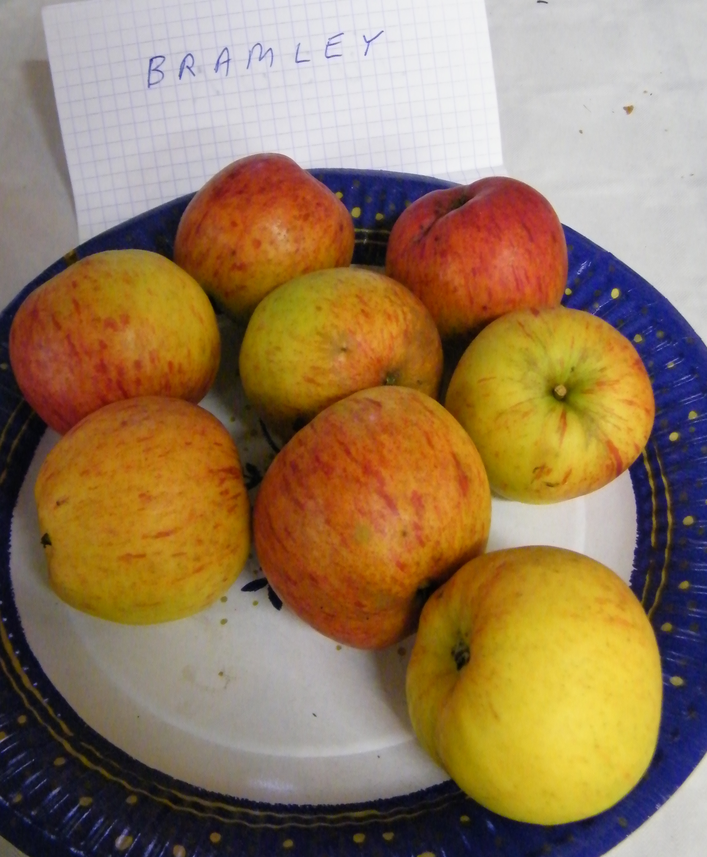 Bramley, Mons-Boubert, Somme, Fr